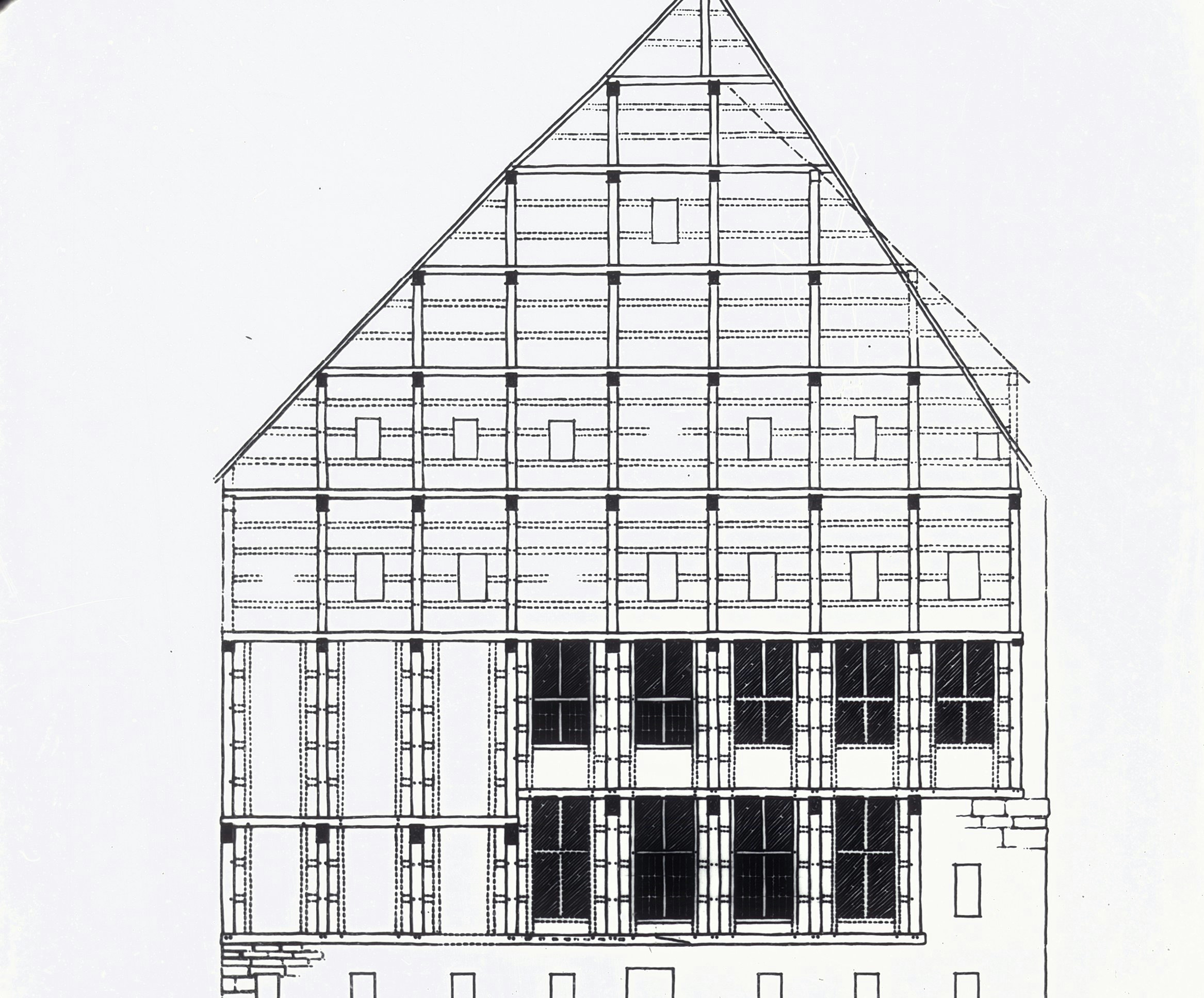 Dinghuis: Exterieur RECONSTRUCTIE TEKENING VAN DE ZIJGEVEL